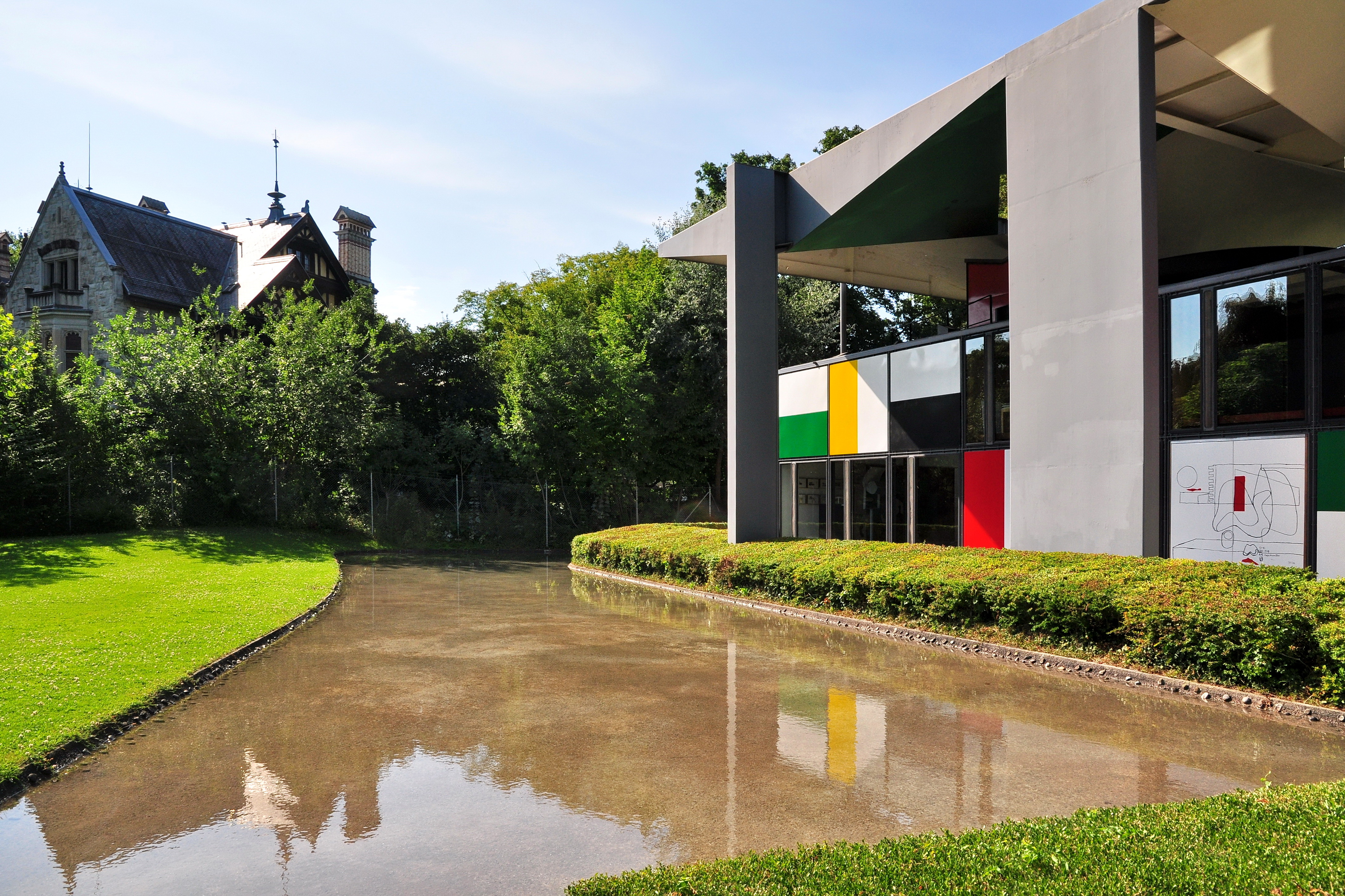 Centre Le Corbusier (Heidi Weber Museum) in Zürich-Seefeld (Switzerland)